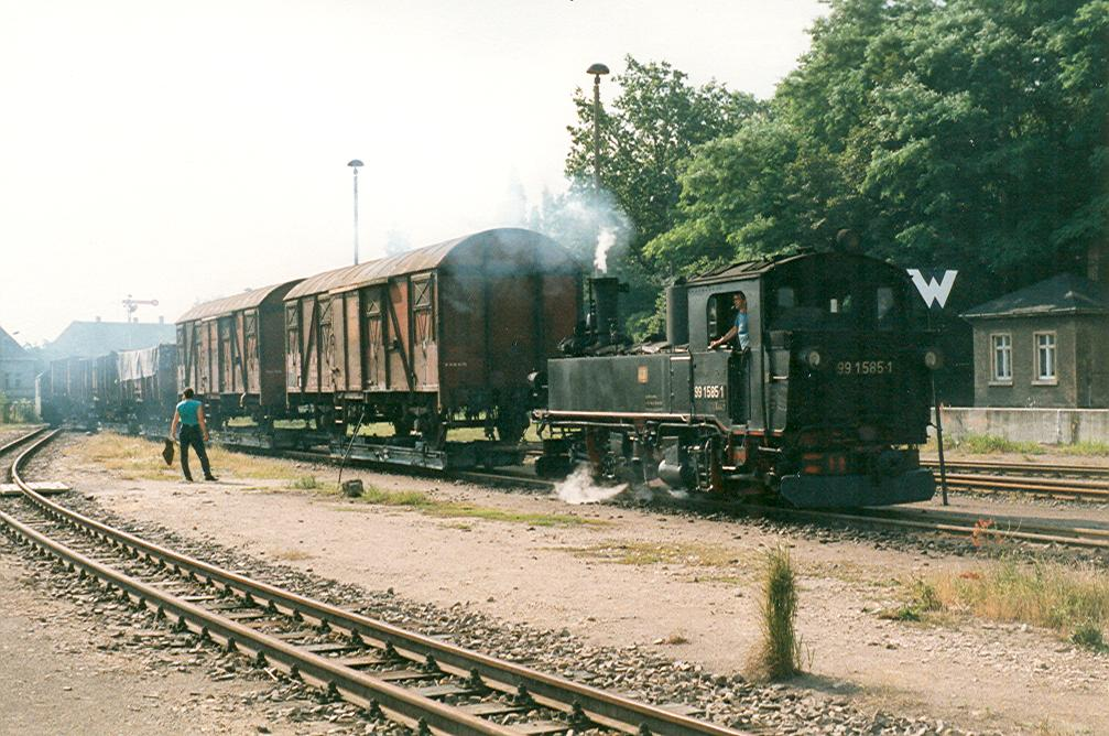 in den Bahnhof Oschatz einfahrender Güterzug